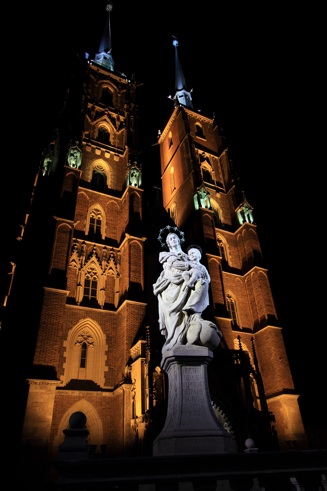 Archikatedra św. Jana Chrzciciela we Wrocławiu w nocnej iluminacji